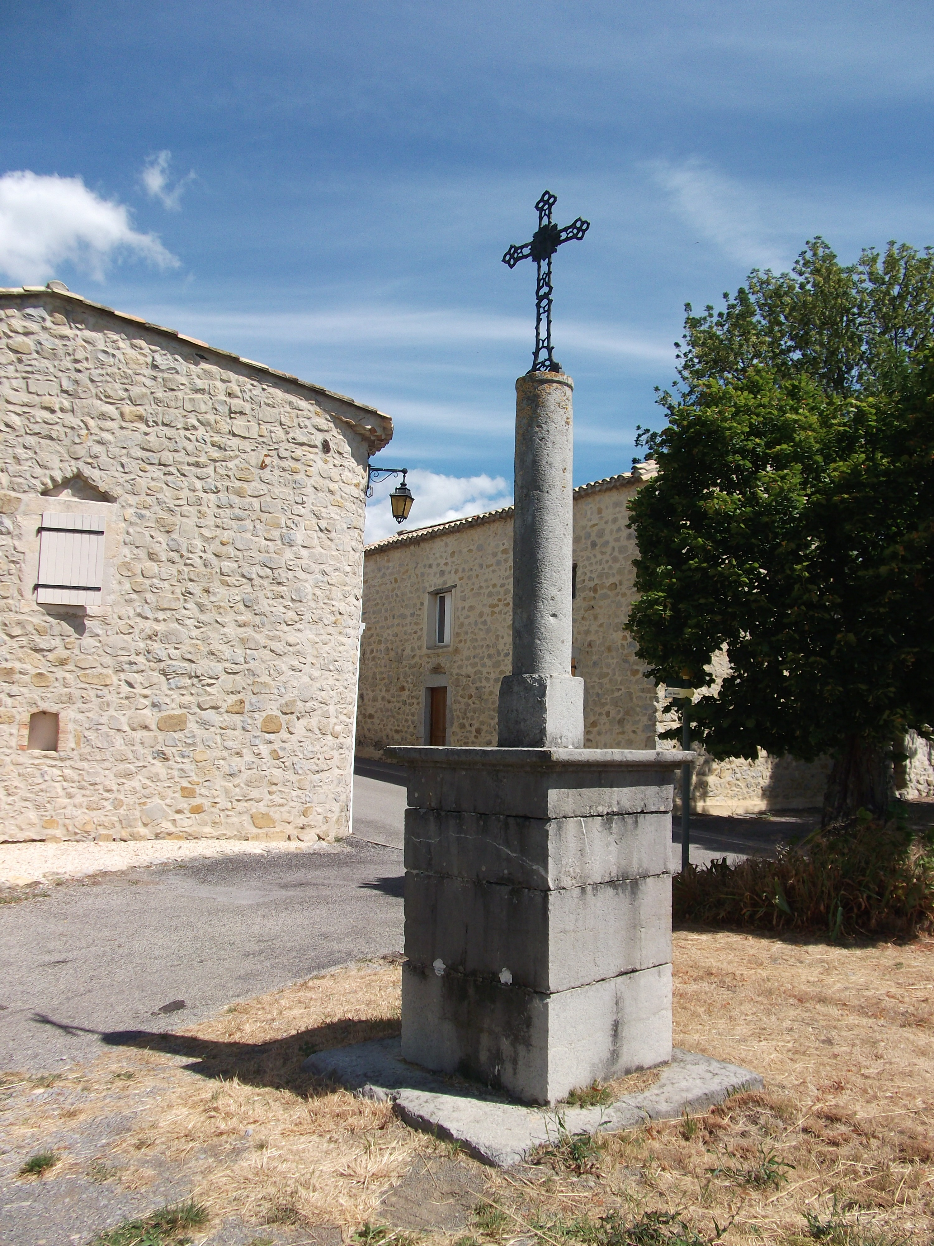 Croix des Pourrettes à ST Andéol-de-Berg Ardèche